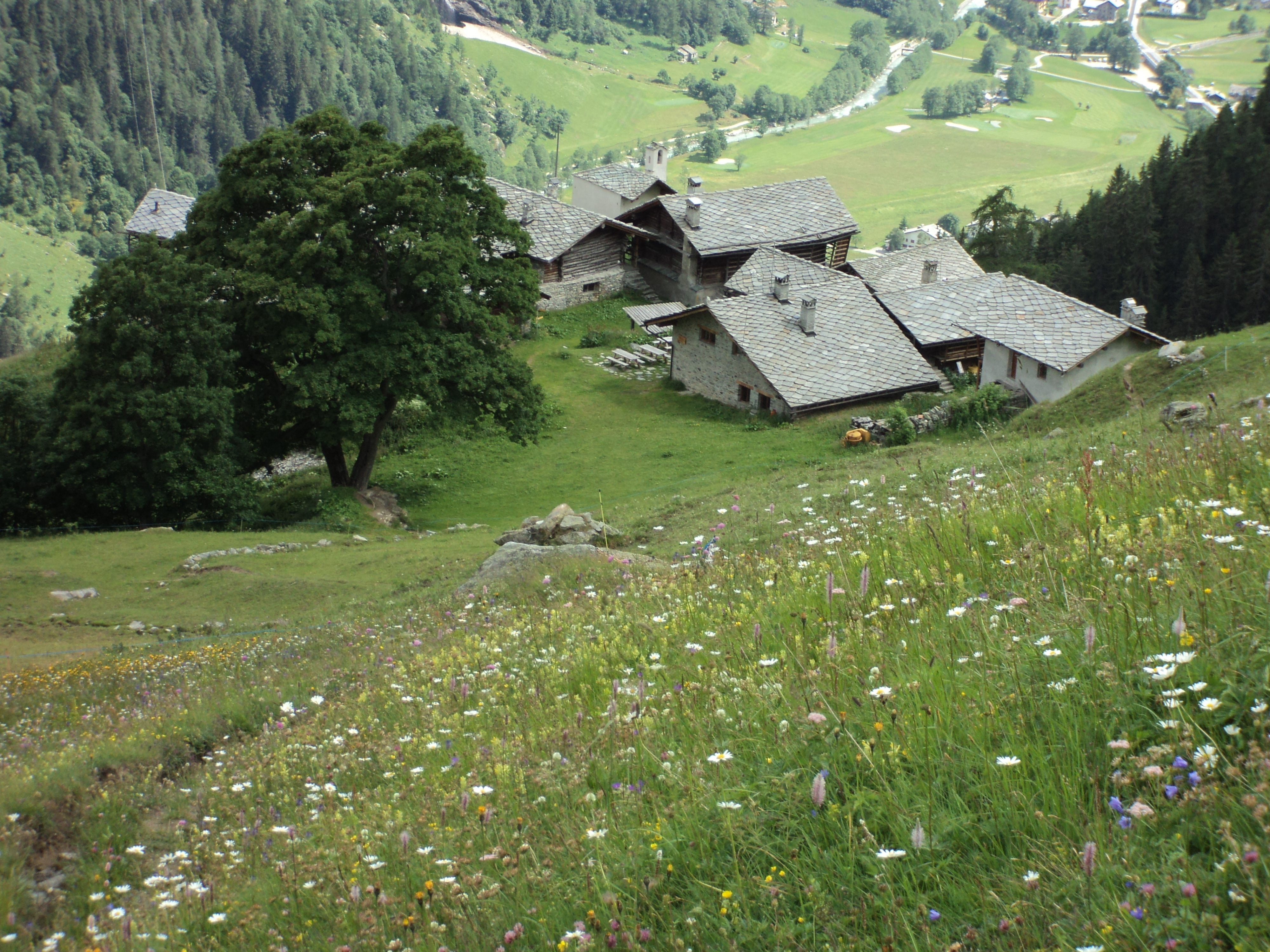 Il villaggio Alpenzù visto salendo verso il colle Pinter.